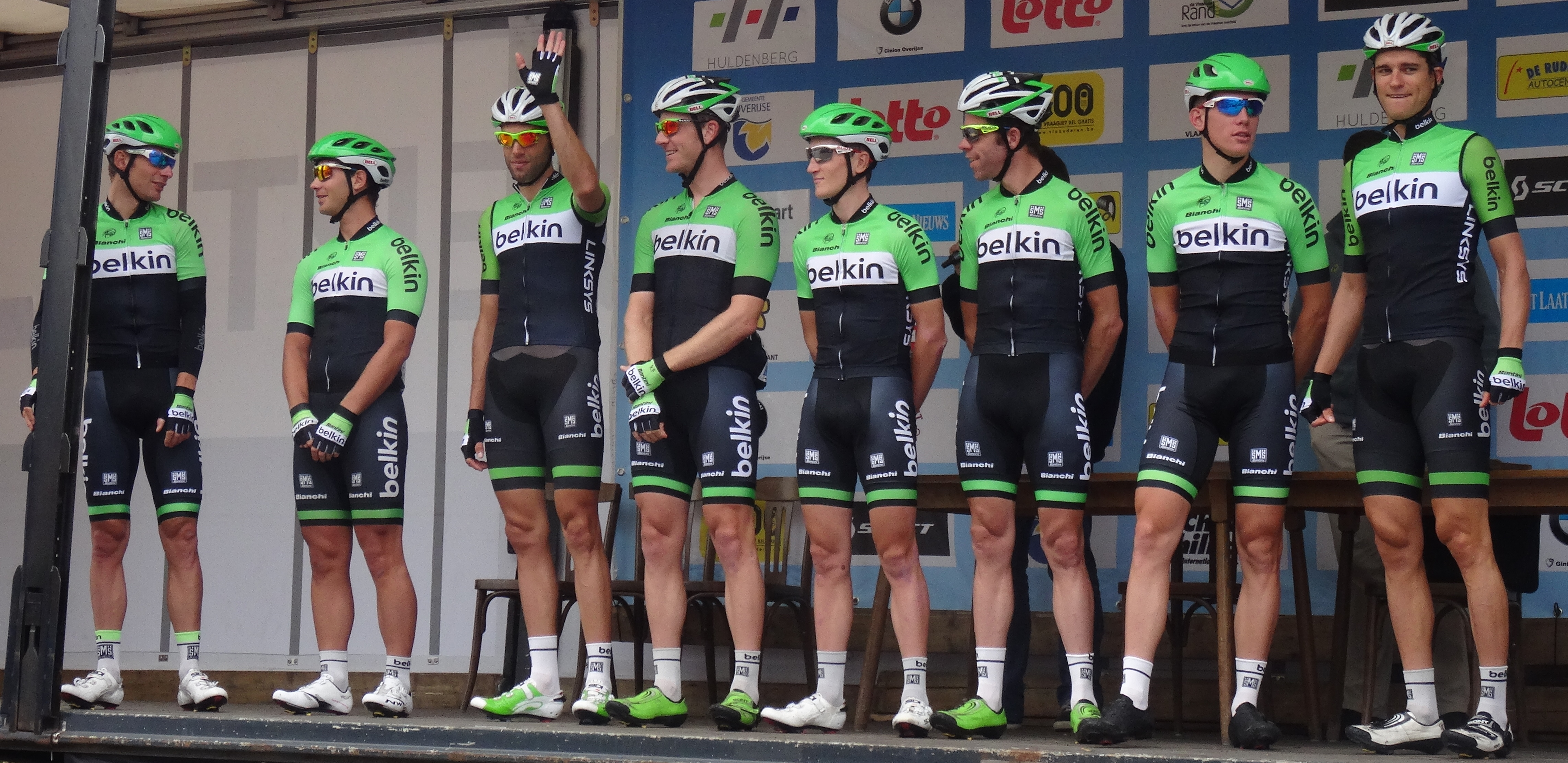 Reportage photographique réalisé le mercredi 27 août à l'occasion du départ de la Druivenkoers Overijse 2014 à Huldenberg, Belgique.